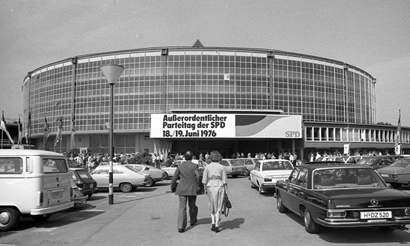 Außerordentlicher Parteitag der SPD in der Westfalenhalle Dortmund (18. bis 19. Juni 1976)